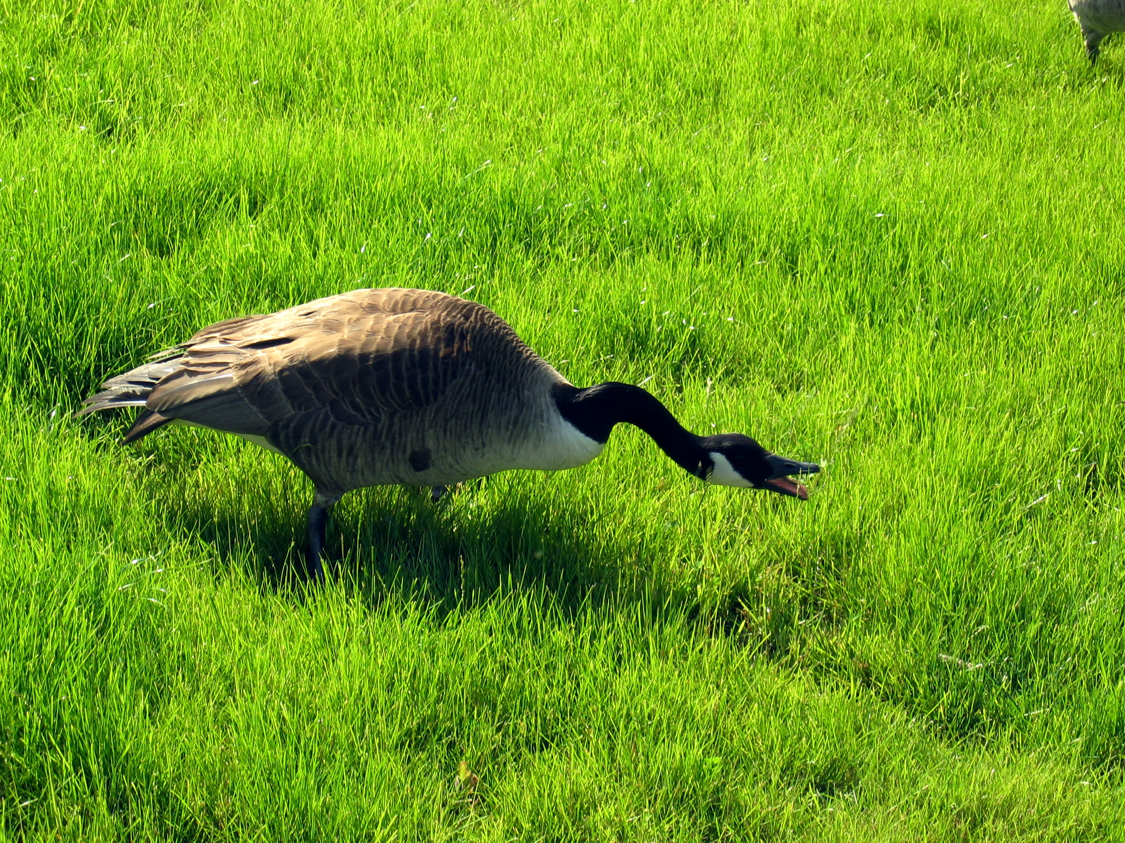 Branta canadensis